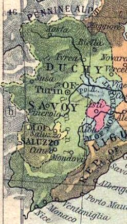 Savoye in 1494. Voor de hele kaart zie Image:Italy 1494 shepherd.jpg